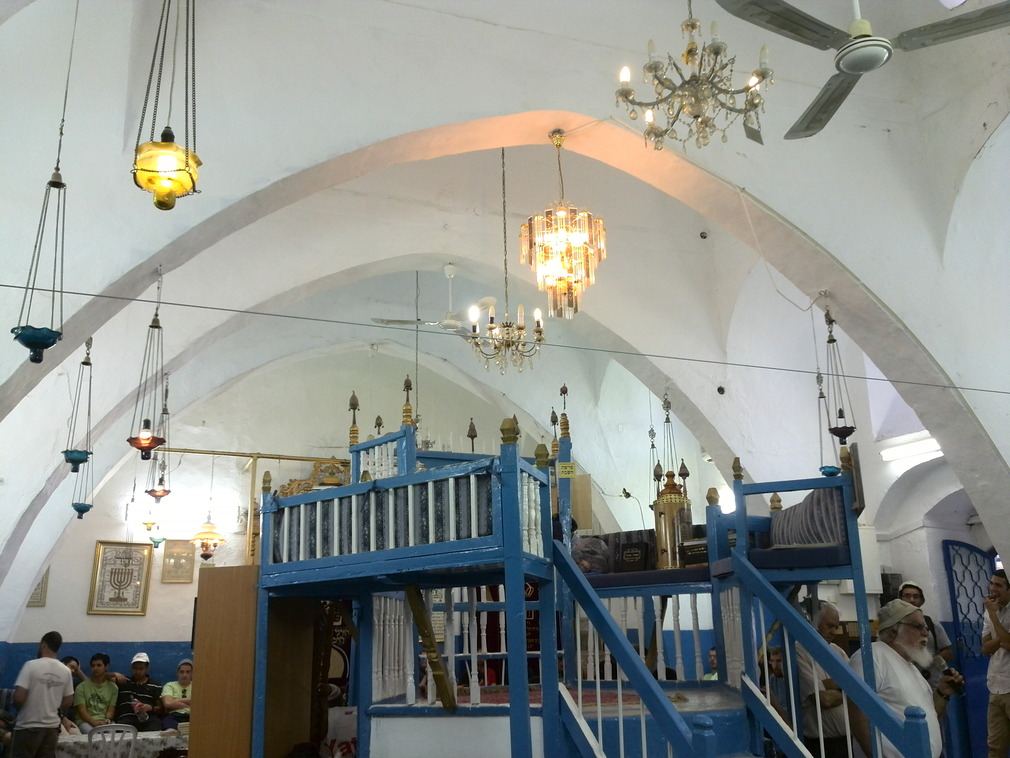 בימת בית הכנסת